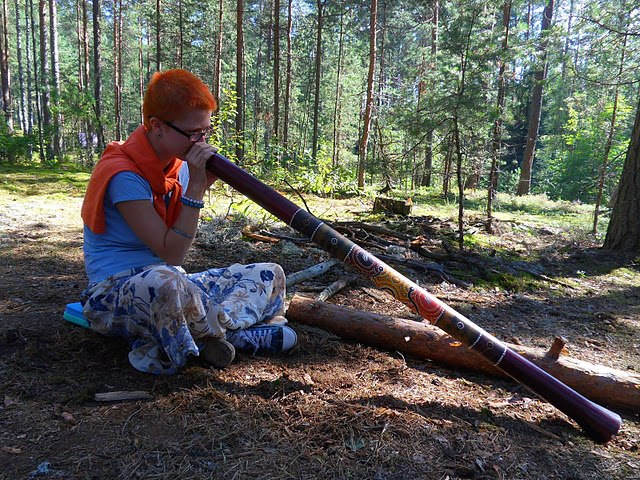 Участница Радуги 2011г.